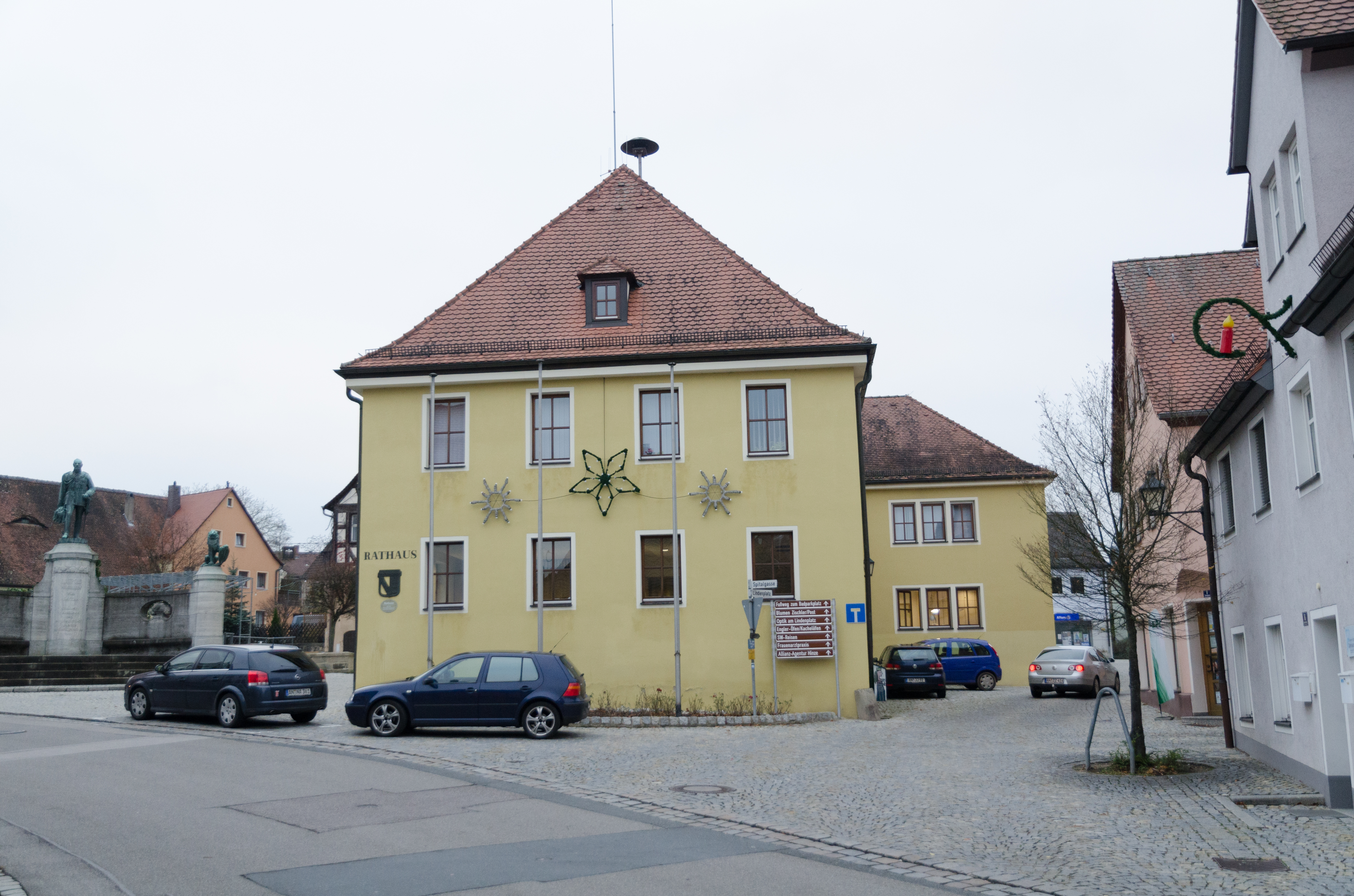 Heilsbronn, Kammereckerplatz 1